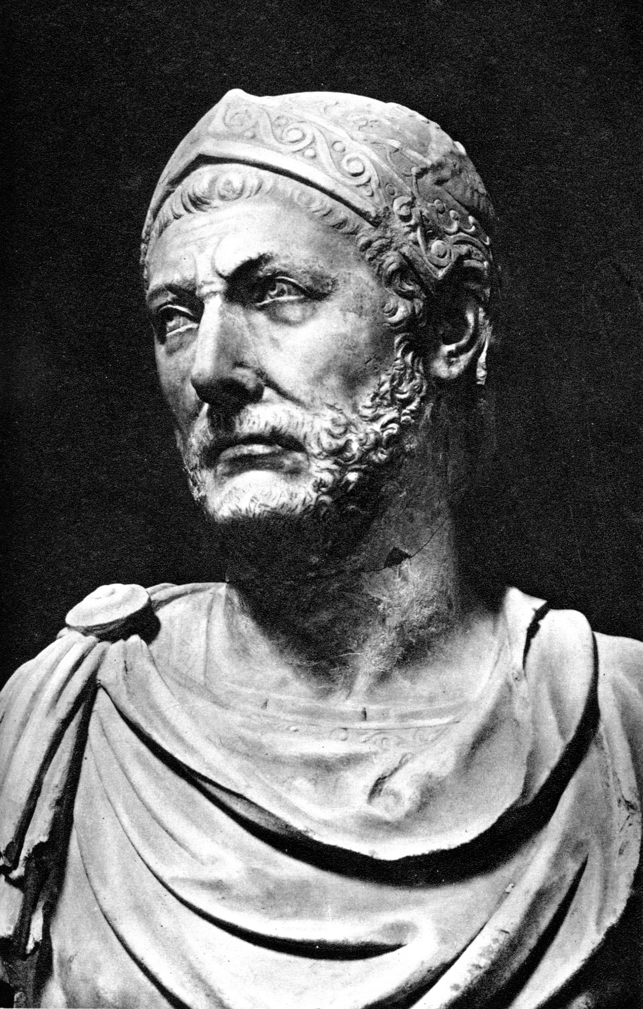 Illustrations from Mommsen's "Römische Geschichte" page 265, Hannibal